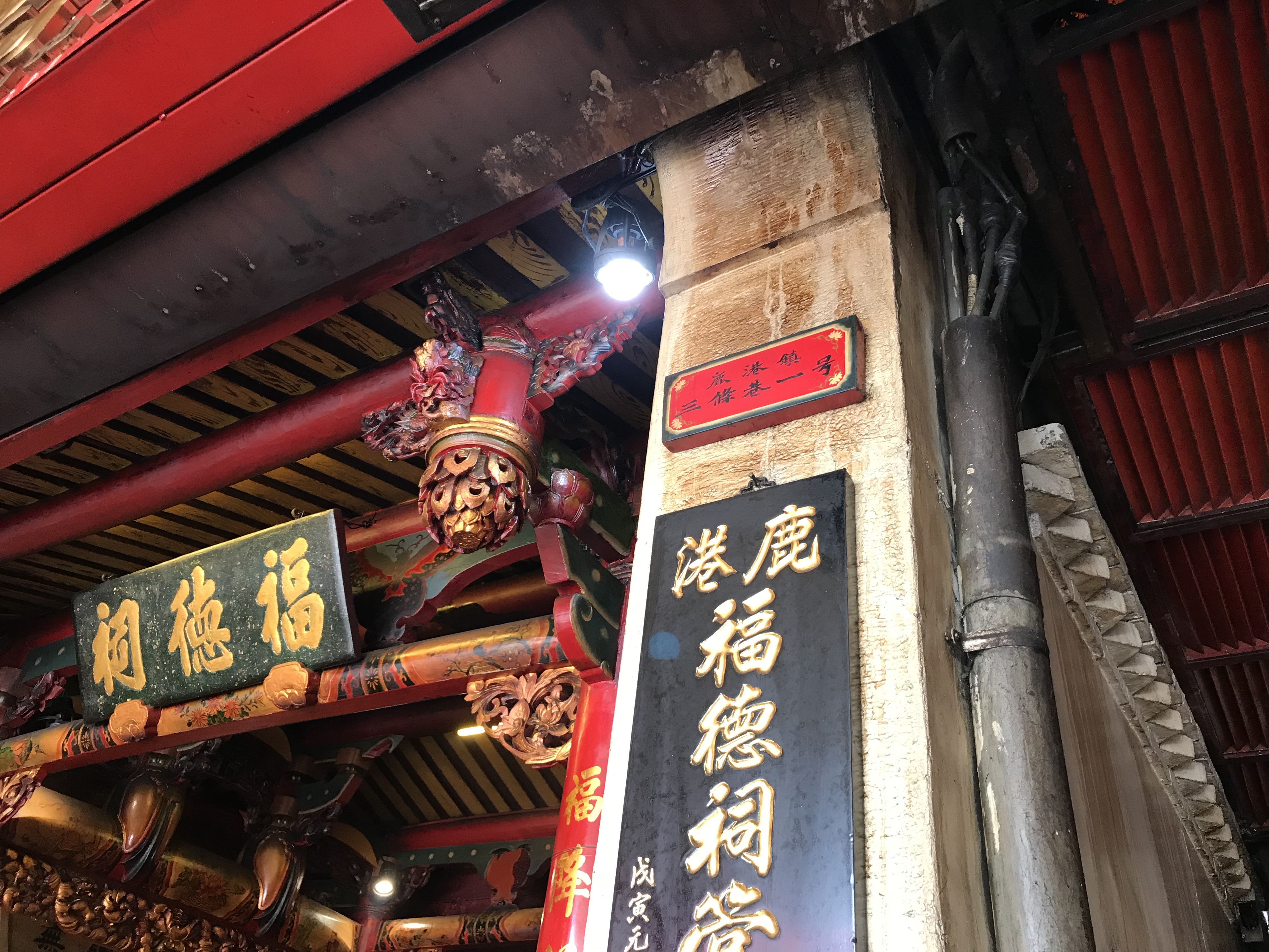 鹿港福德祠門牌